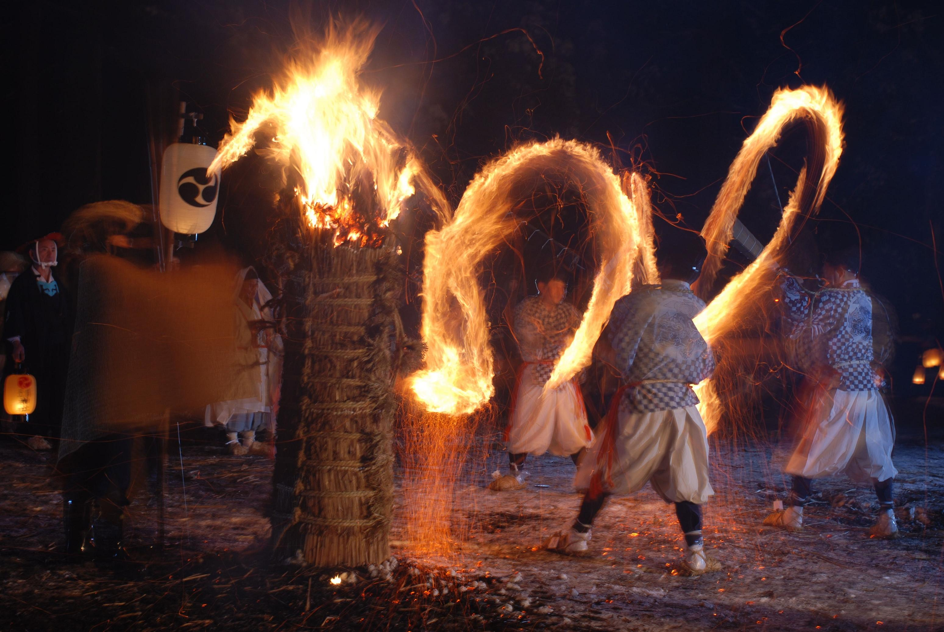 Les Yamabushi prient pour une bonne récolte à travers les flammes